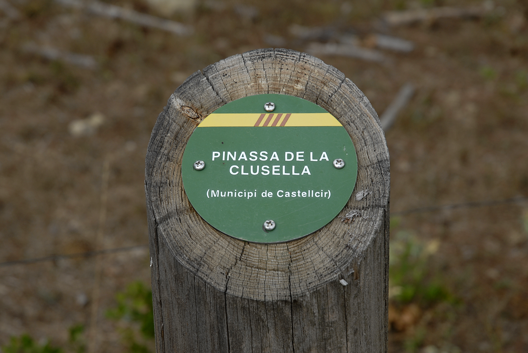 Imatge de la placa informativa situada al costat de la Pinassa de la Closella.